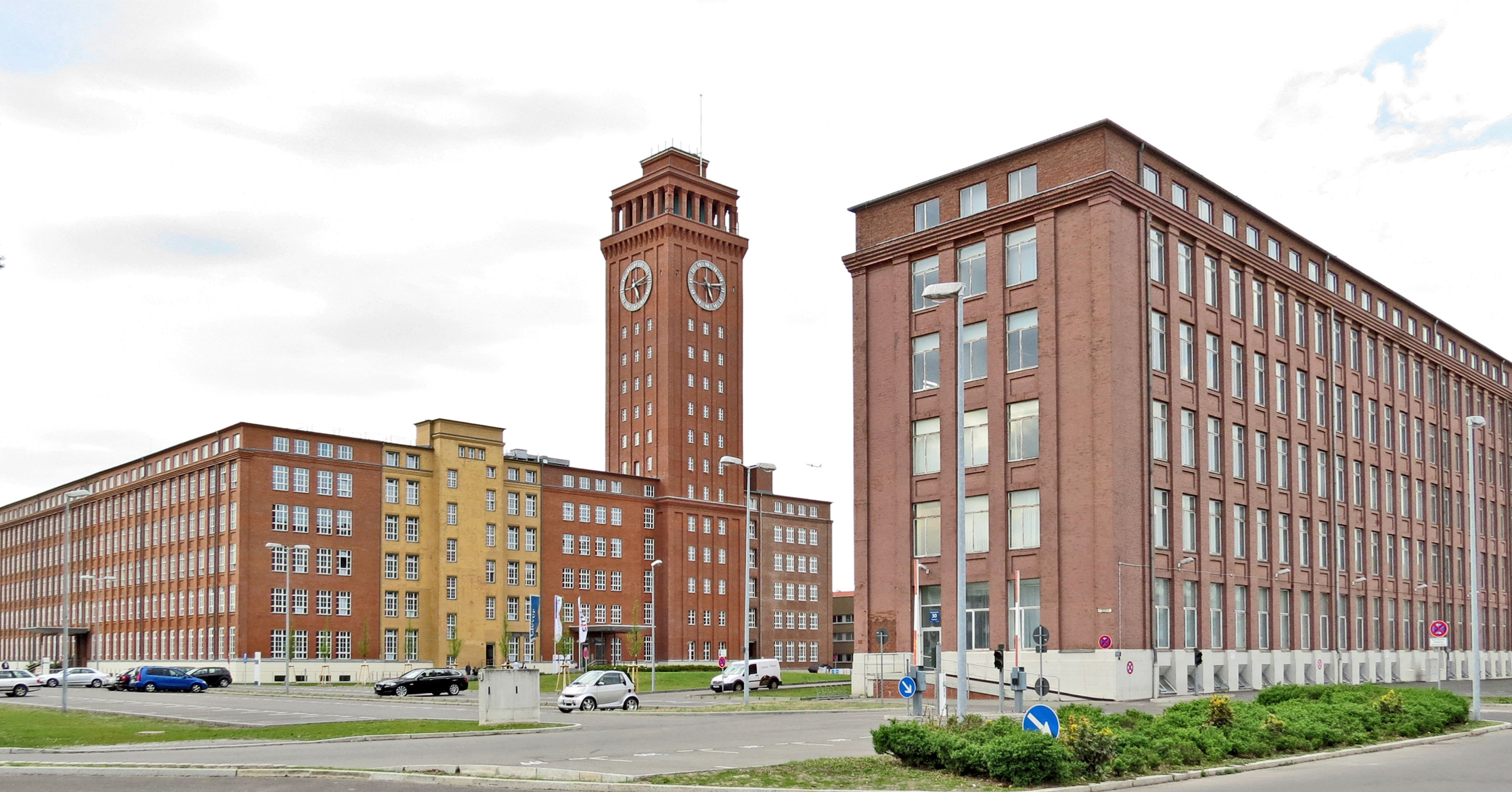 Siemensturm in Berlin-Siemensstadt